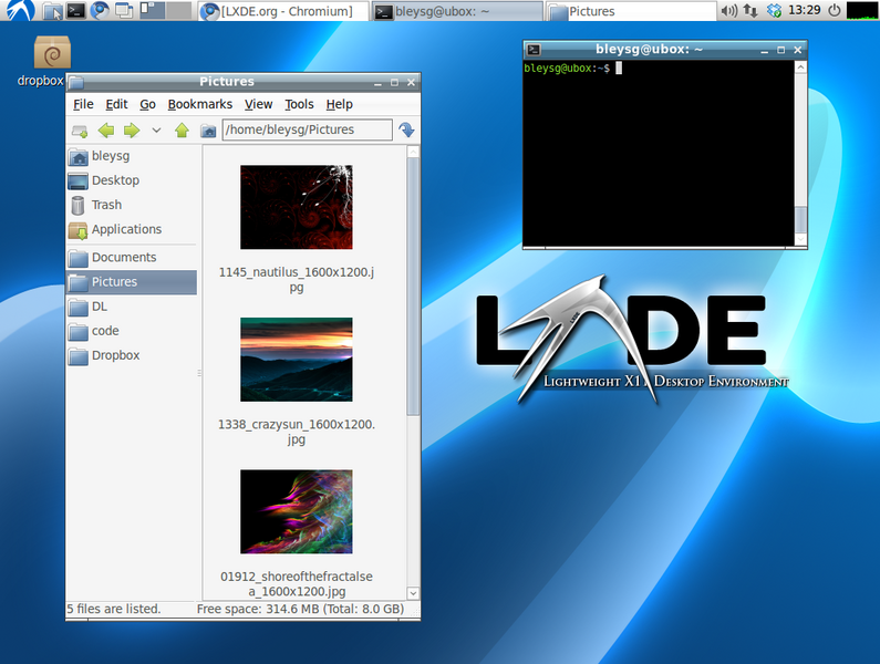 LXDE